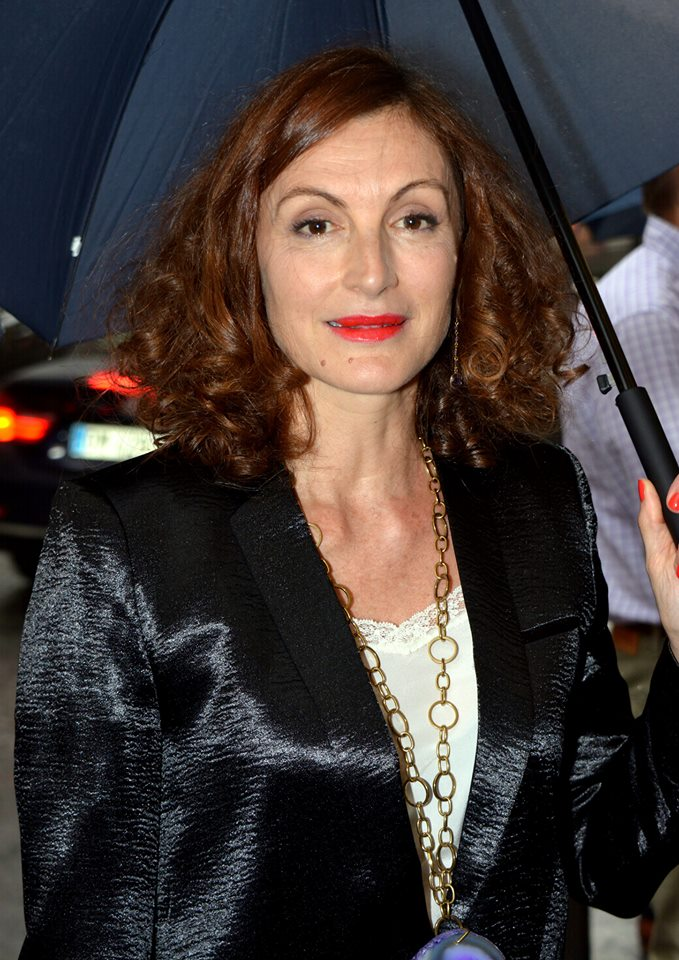 Camille Japy à la cérémonie des Molières